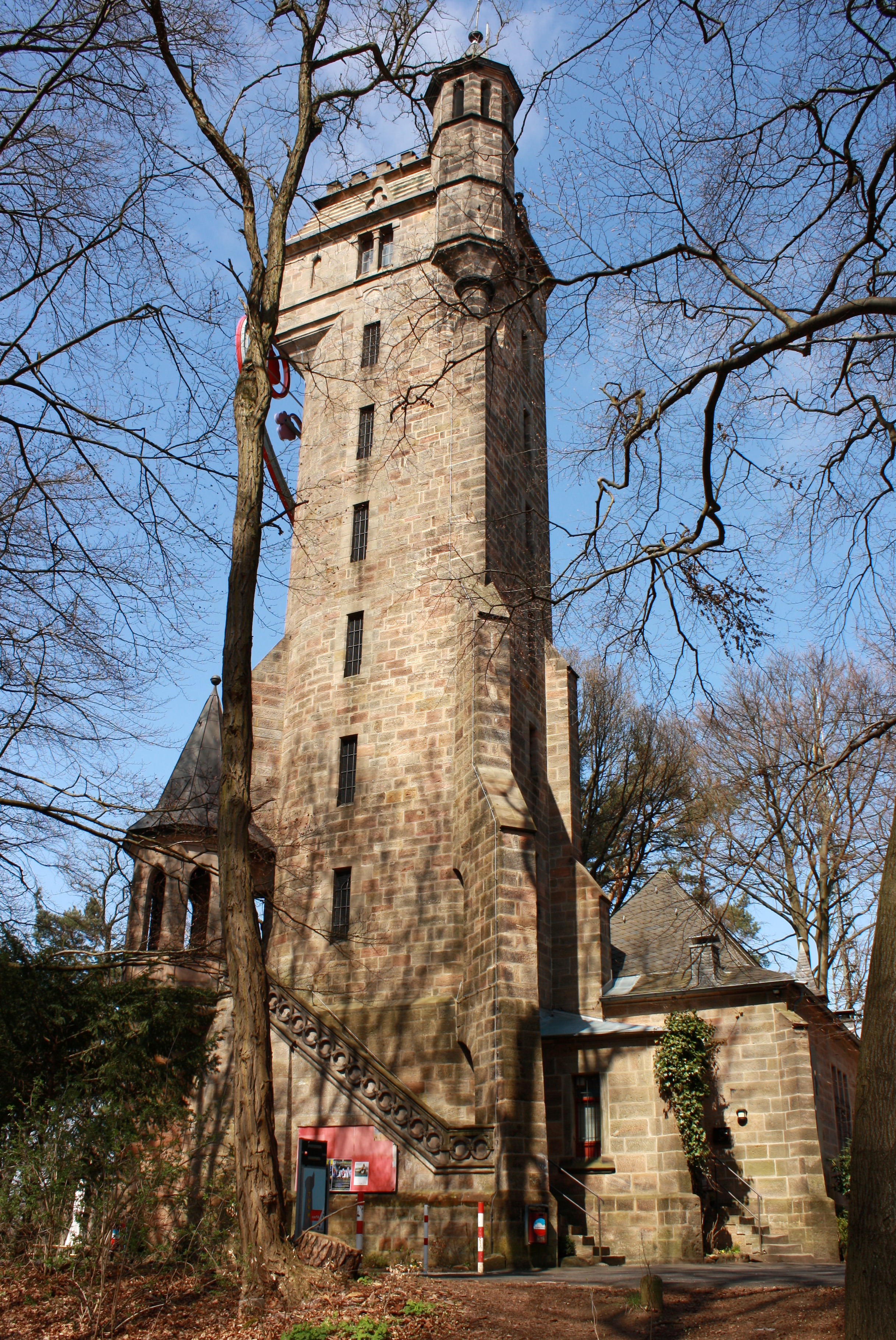 Der Spiegelslustturm auf den Marburger Lahnbergen, von Süden